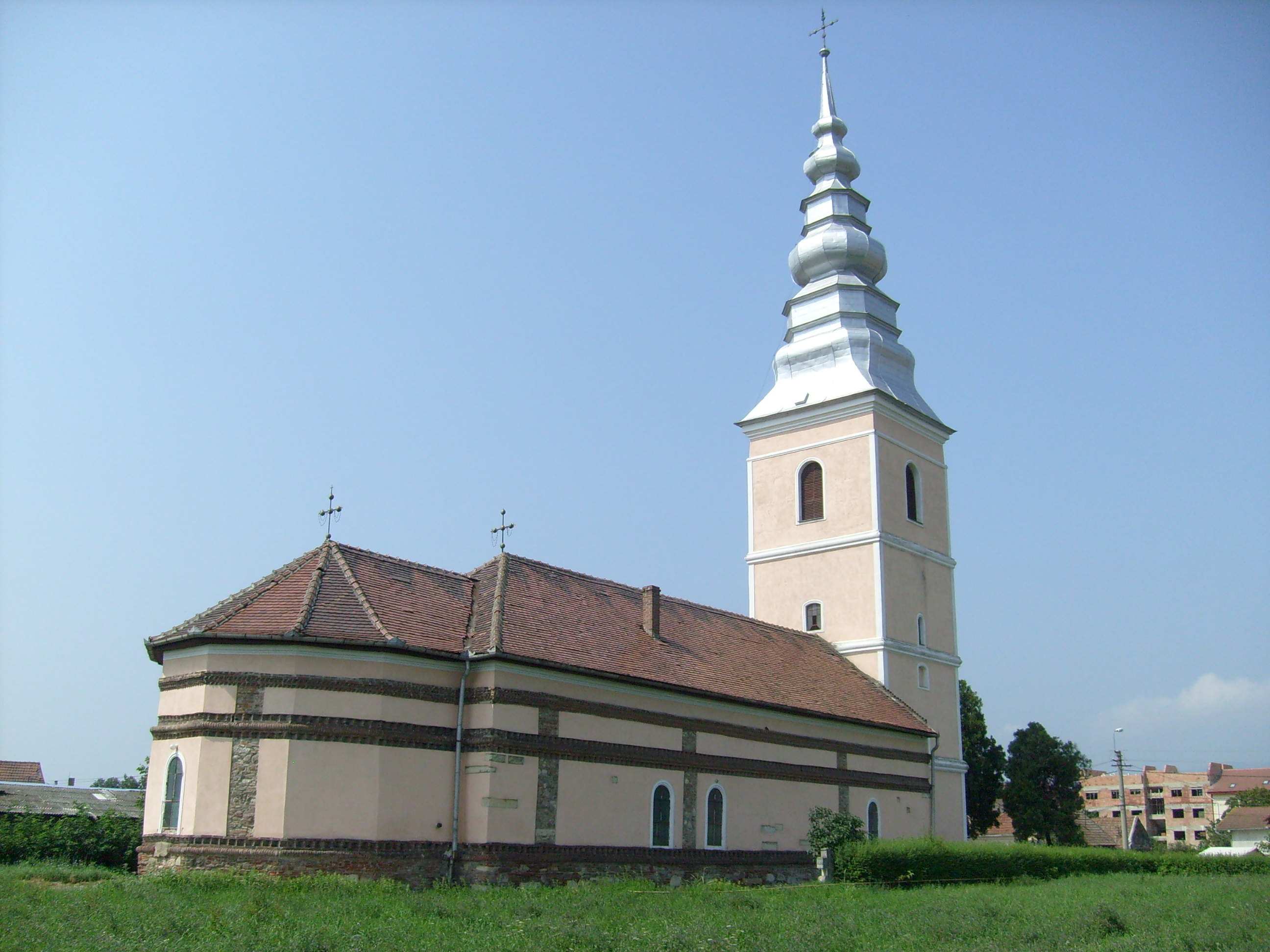 Biserica Unita din Maieri (Alba Iulia). Construita in 1713.